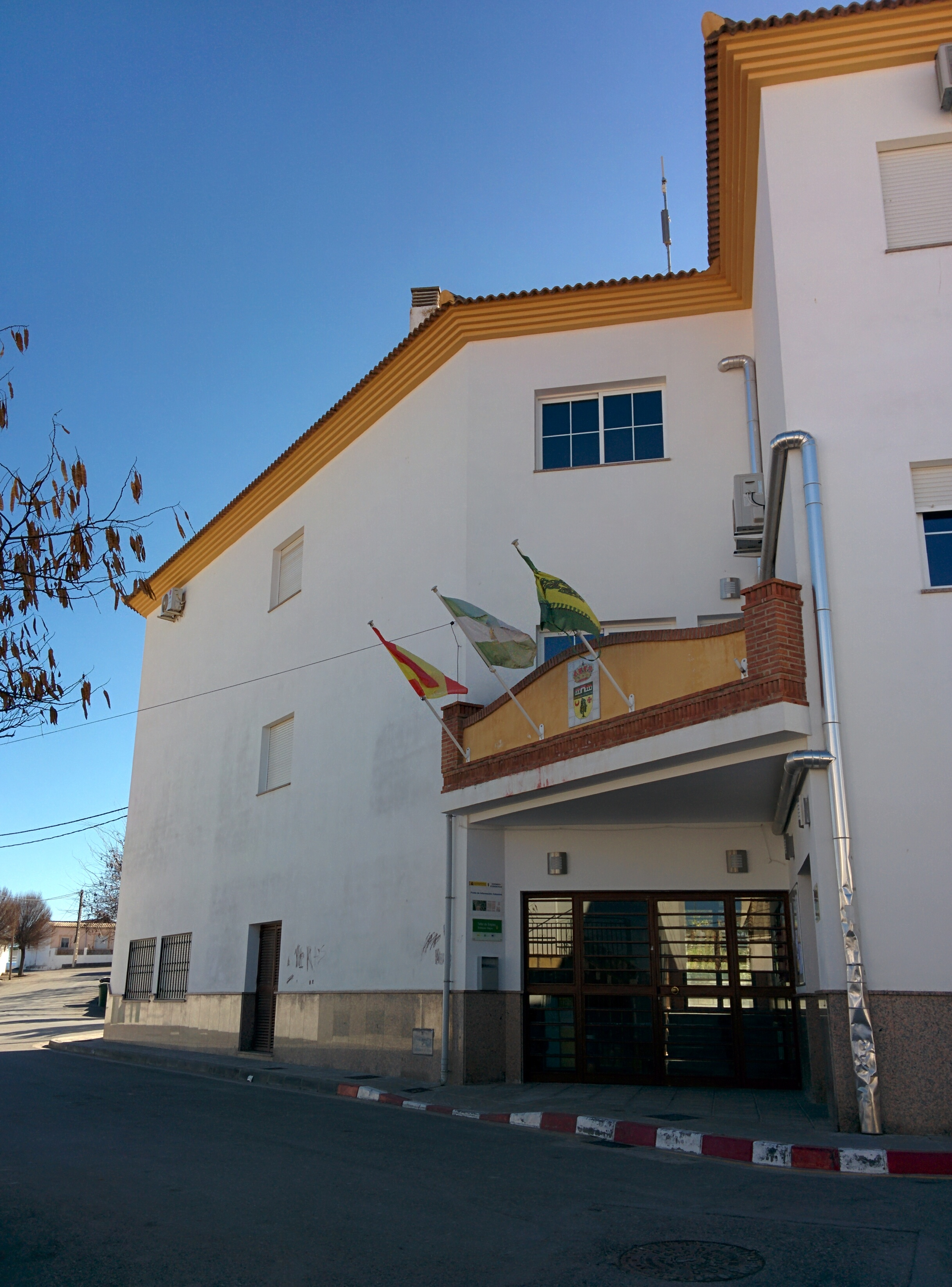 Casa consistorial, Dehesas Viejas (Granada, España).